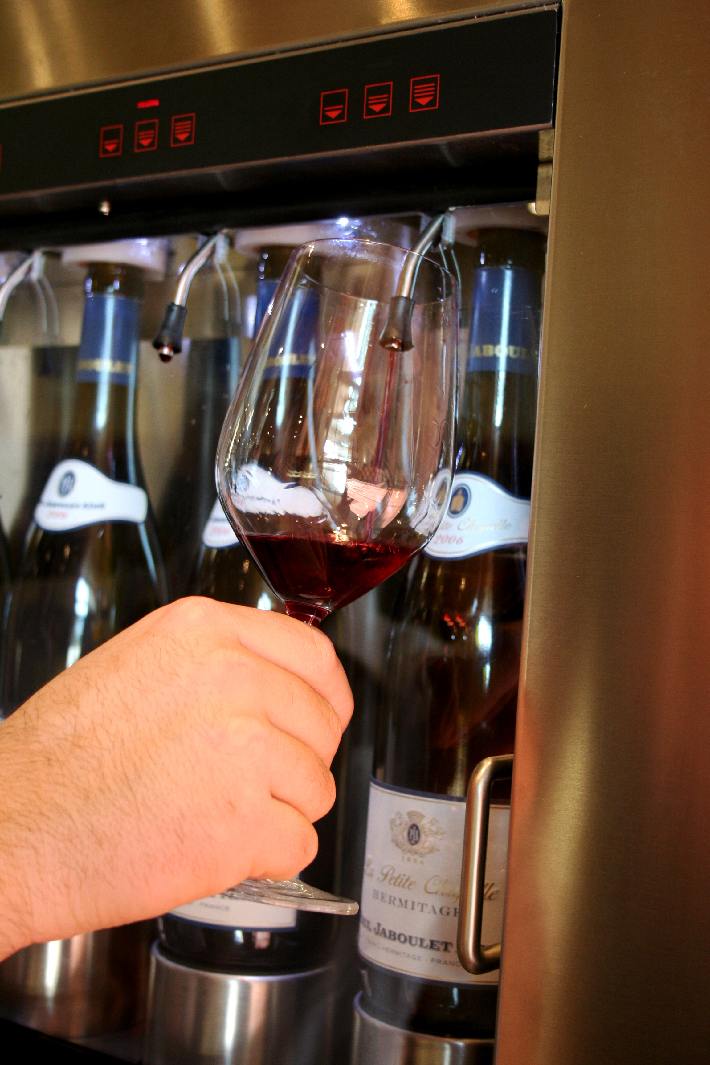 Dégustation d'un Hermitage AOC de Jabouletr